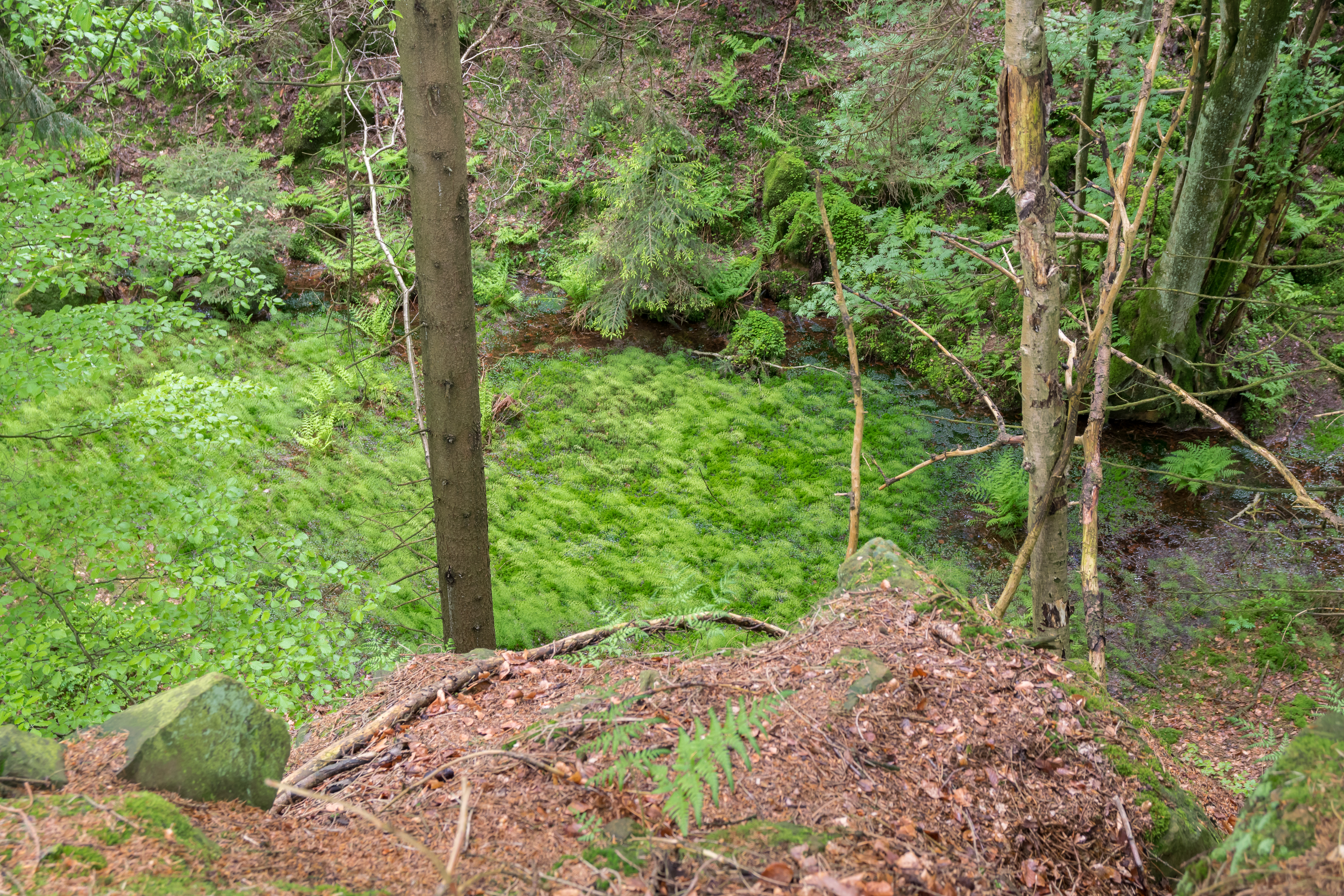 Aufgegebene Eisenbahnbaustelle Alte Eisenbahn, Osteinschnitt in Willebadessen, Kreis Höxter